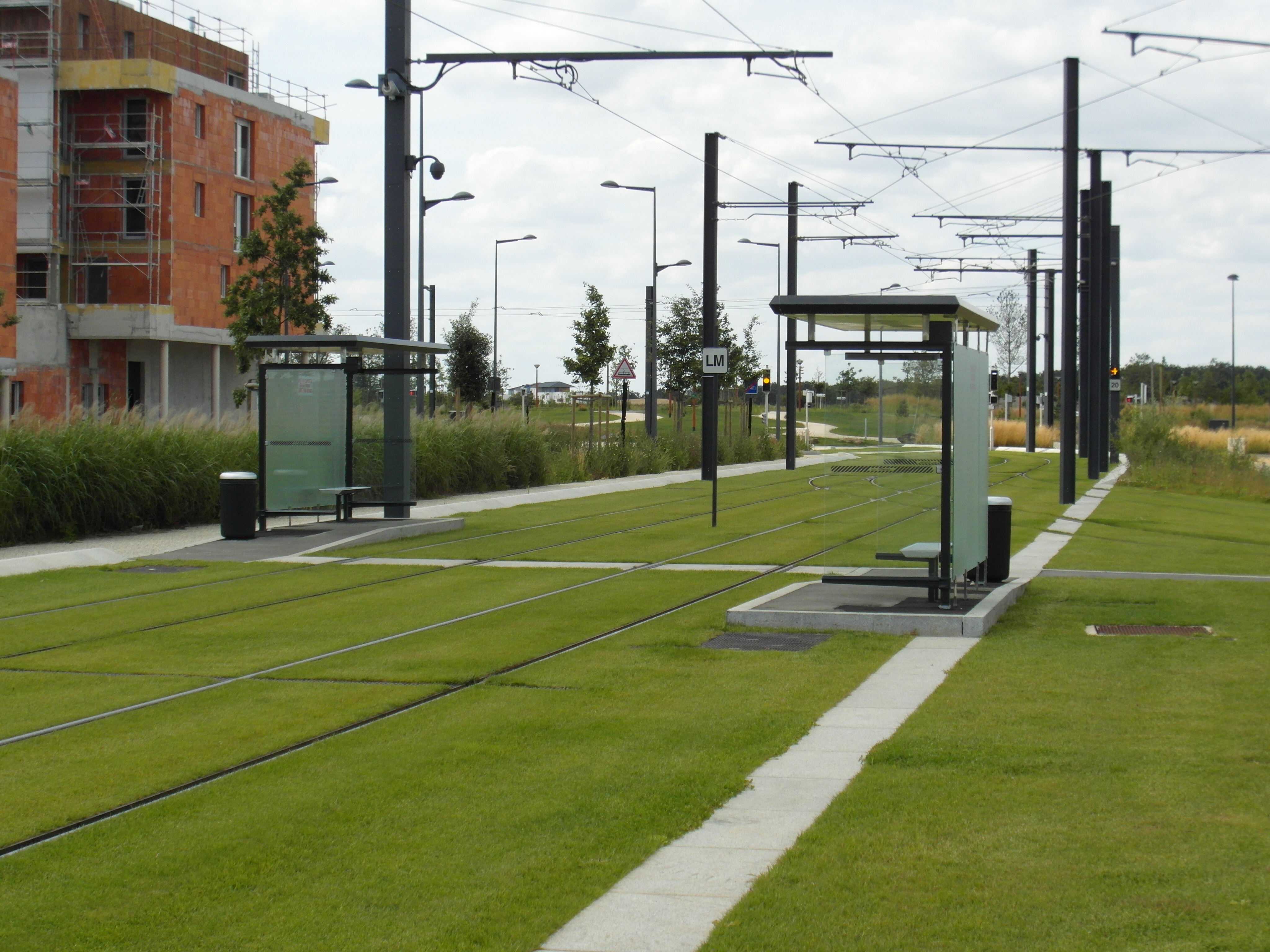 Straßenbahn Angers - Städtebeuliche Integration im Bereich Mayenne / Capucins, einem Entwicklungsgebiet auf ehemaligem Militärflughafengelände